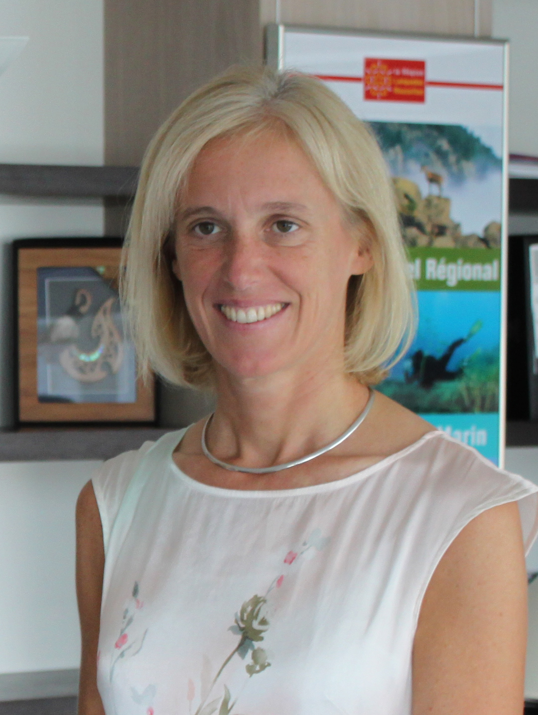 Ségolène Neuville, le 17 juillet 2014